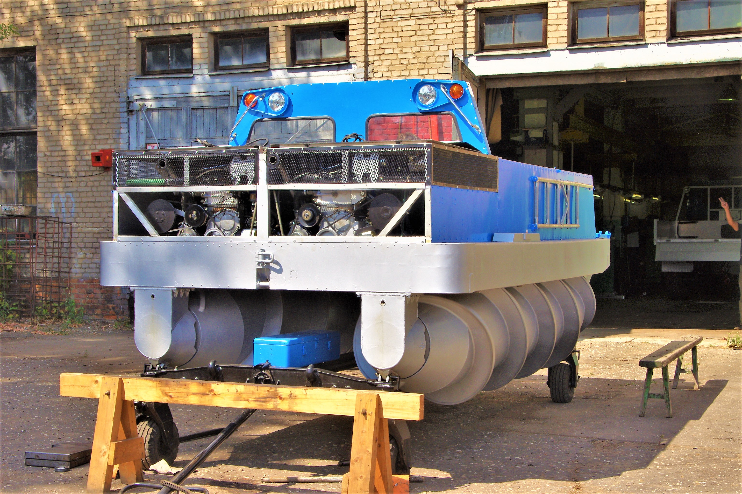 Шнекоход ЗИЛ / ZIL screw vehicle